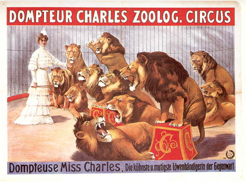 Dompteur Charles Zoolog. Circus - Dompteuse Miss Charles.(Miss Charles ist Ida Krone, die Frau des Zirkusdirektors Carl Krone. Farblithographie